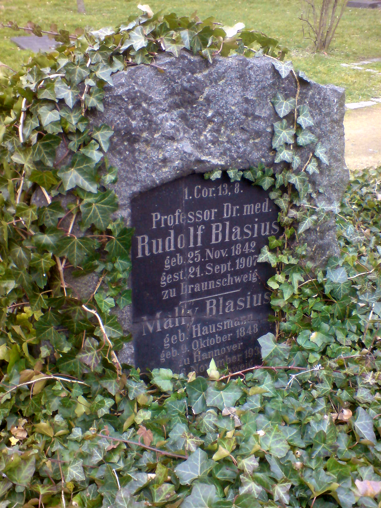 Grabinschrift: "1. Cor. 13,8. Professor Dr. med Rudolf Blasius, geb. 25. Nov. 1842, gest. 21. Sept. 1907 zu Braunschweig. / Mally Blasius, geb. Hausmann, geb. 9. Oktober 1848 zu Hannover, gest. 16. November 1930 zu Braunschweig." Foto aufgenommen auf dem Friedhof der Reformierten Gemeinde (Braunschweig, Juliusstrasse.)